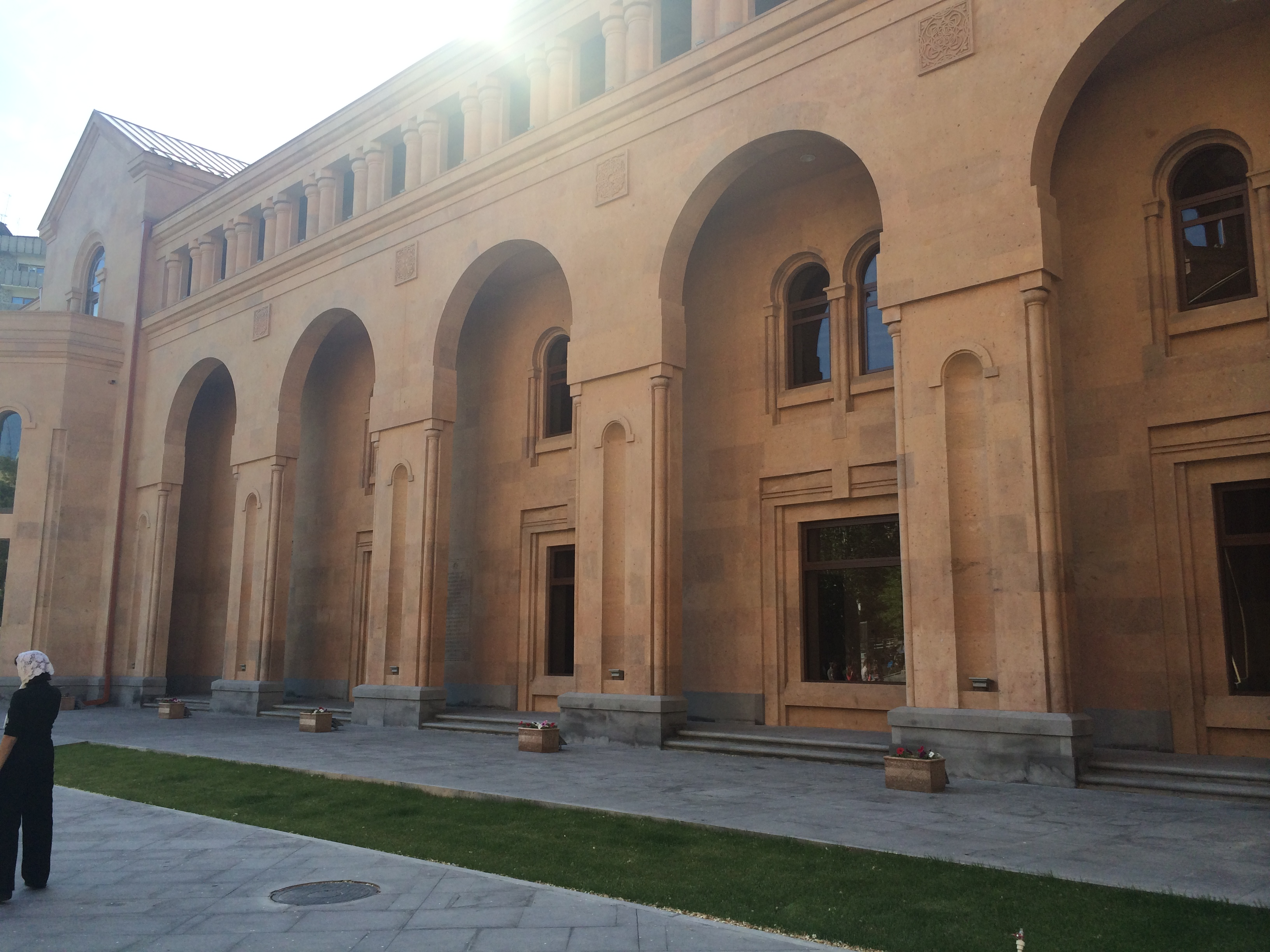 Կաթողիկոսական նստավայրի հոգևոր համալիրը Սուրբ Աննա եկեղեցու բակում (Աբովյան - Սայաթ-Նովա խաչմերուկ)